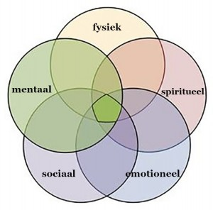 Eskematikoki adierazten du holismoaren azalpena